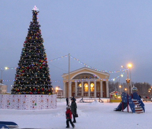 Площадь Кирова в Петрозаводске. Декабрь 2014 года.